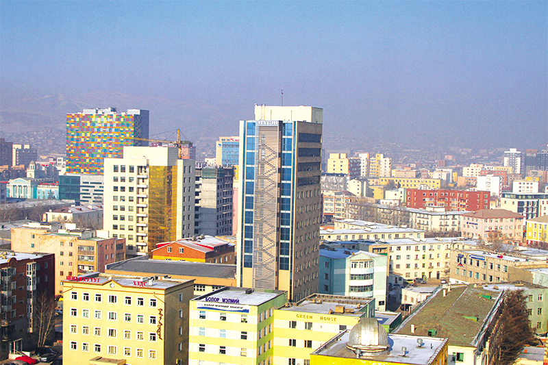 Монгол: Bair_2